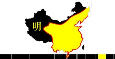 Beschreibung: Gebiet der Ming-Dynastie Fotograf: Zhou Yi am 7. 7. 2004 7. 2004 by Zhou Yi